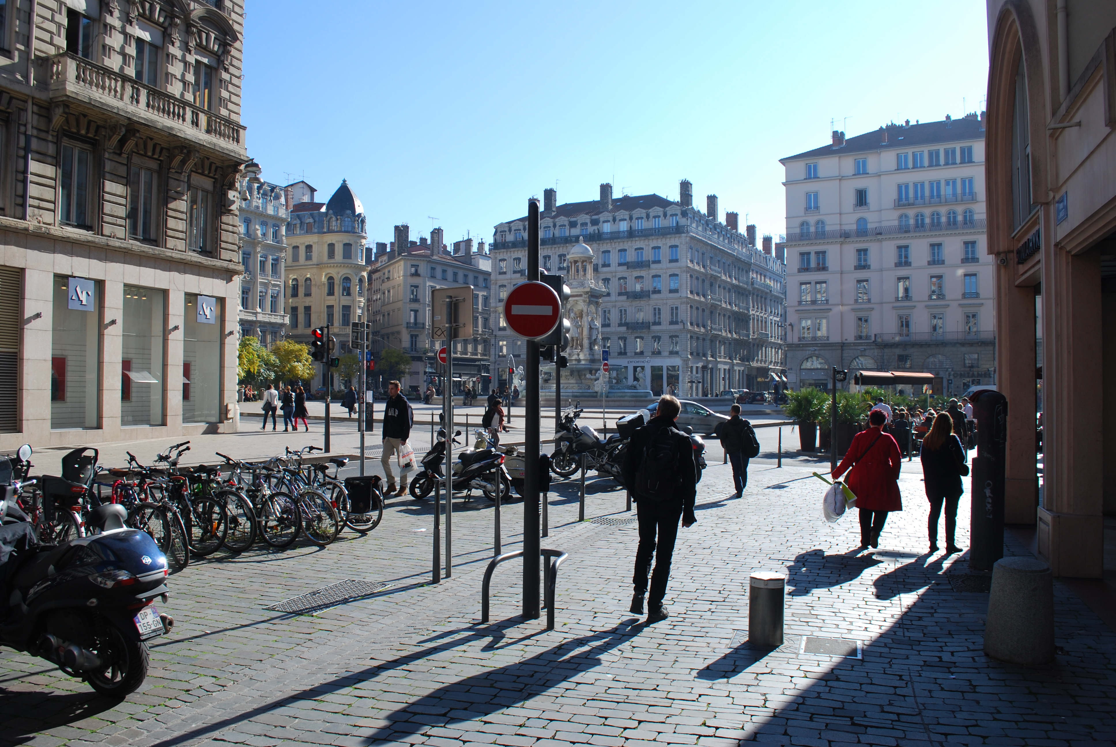 Vue de Lyon.